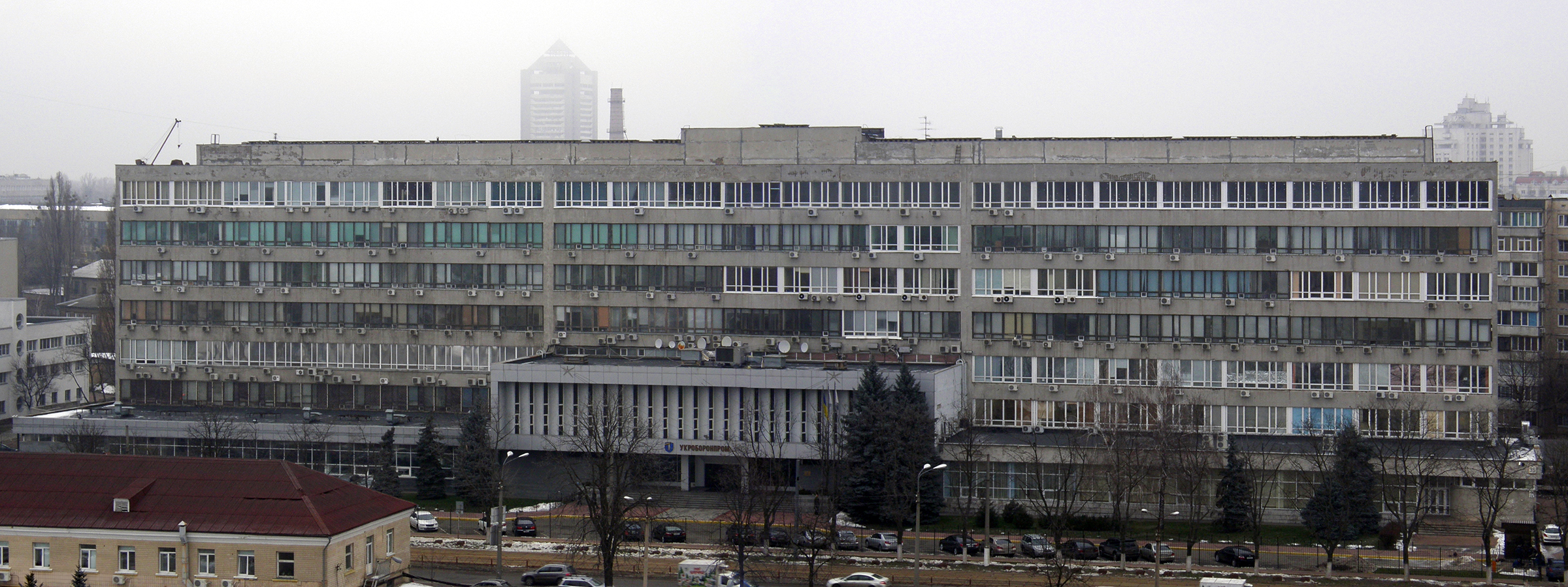 Укрспецэкспорт